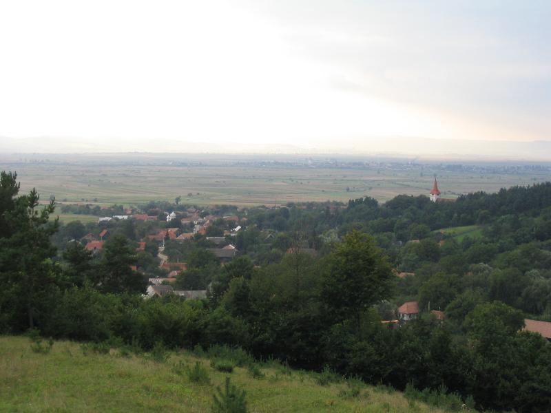 Bikfalva